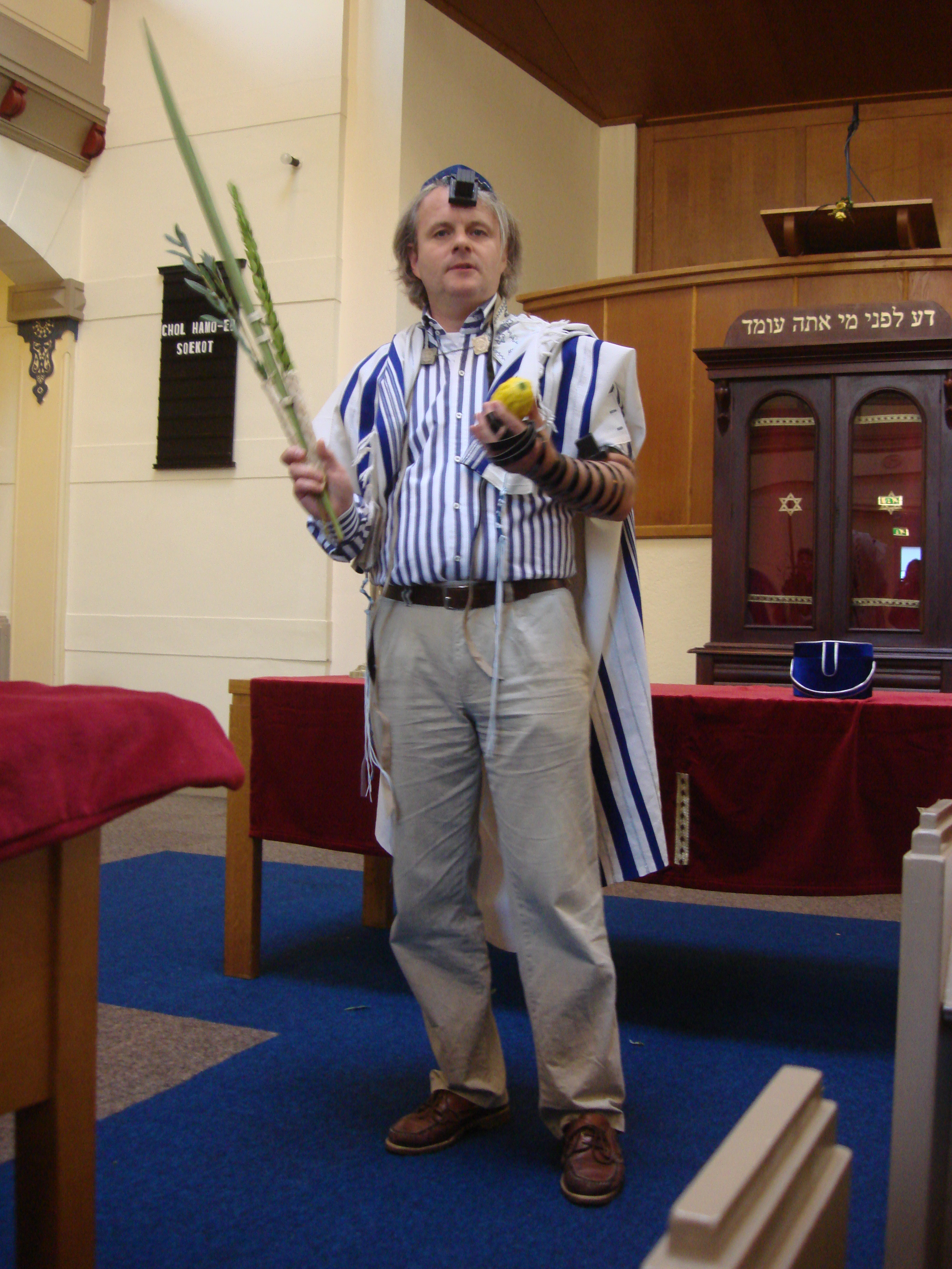 Chazzan Tom A. Fürstenberg van de Joodse gemeente Beth Shoshanna geeft uitleg over loelav en etrog in de Grote Synagoge van Deventer